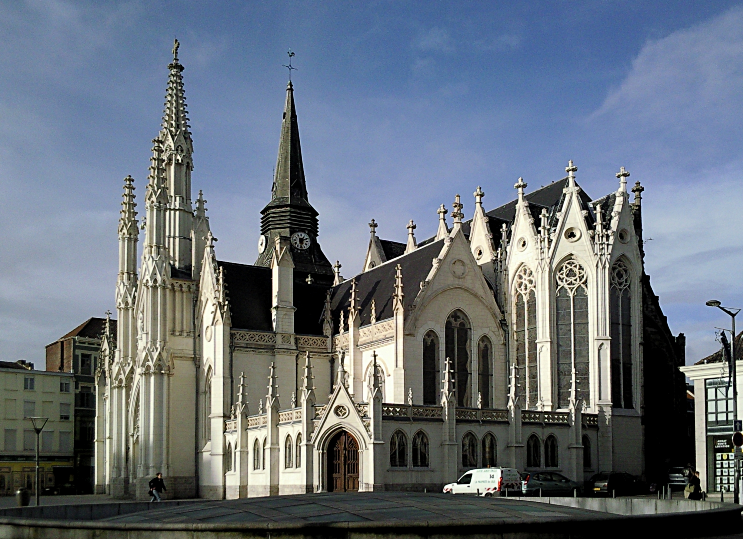 L'église Saint-Martin de Roubaix (Nord).